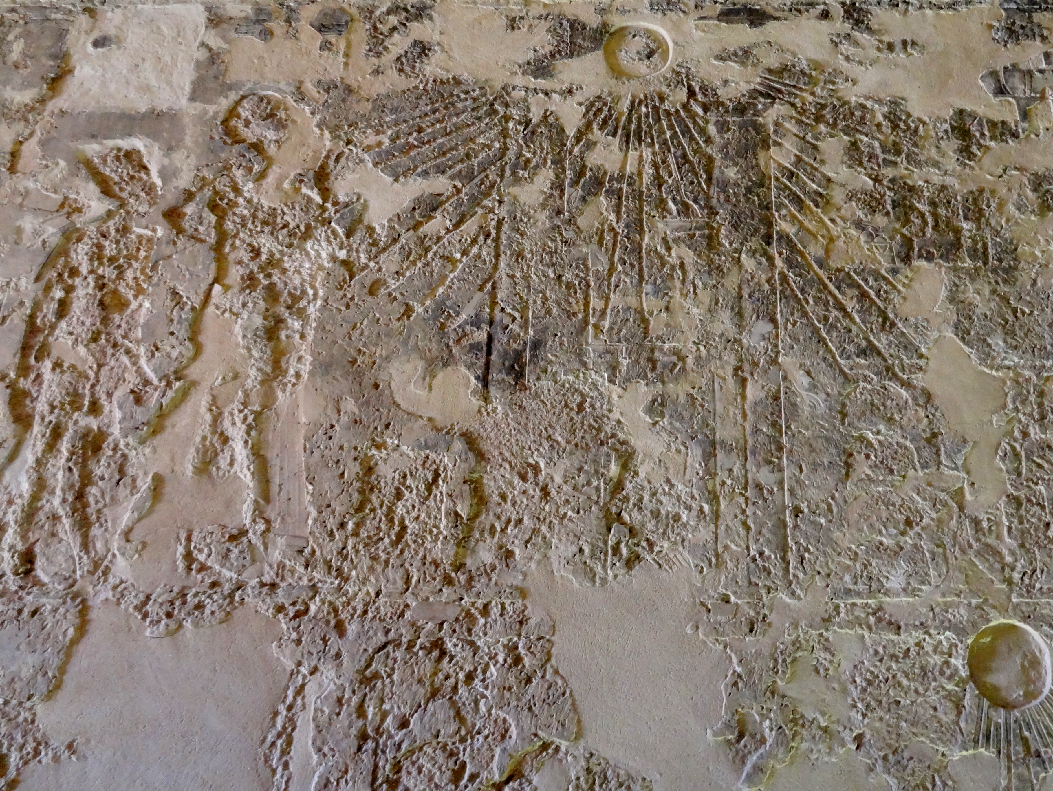 Grab des Pentu (TA 5) in Tell el-Amarna, Ägypten